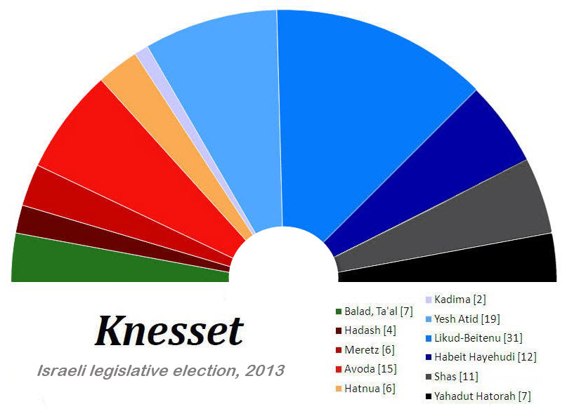 Israeli legislative election, 2013